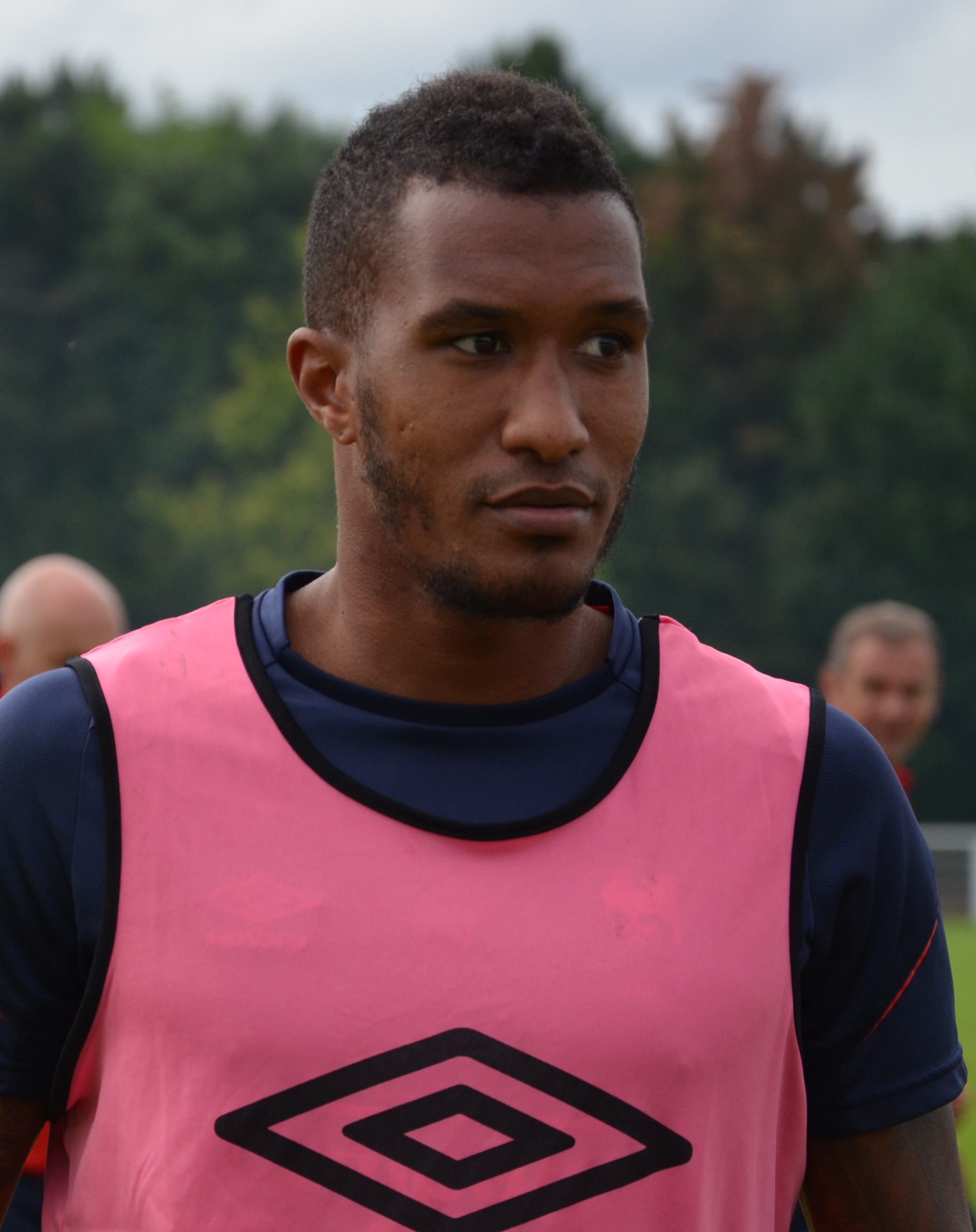 Photographie prise lors du match opposant le SM Caen à l'UNFP en match amical au stade Louis-Villemer de Saint-Lô le 30 juillet 2016. Ici, Emmanuel Imorou.